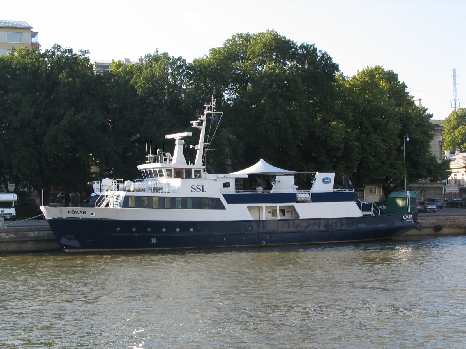 Suomen saaristolaivojen (SSL) yhteysalus Kökar Aurajoessa Turussa.